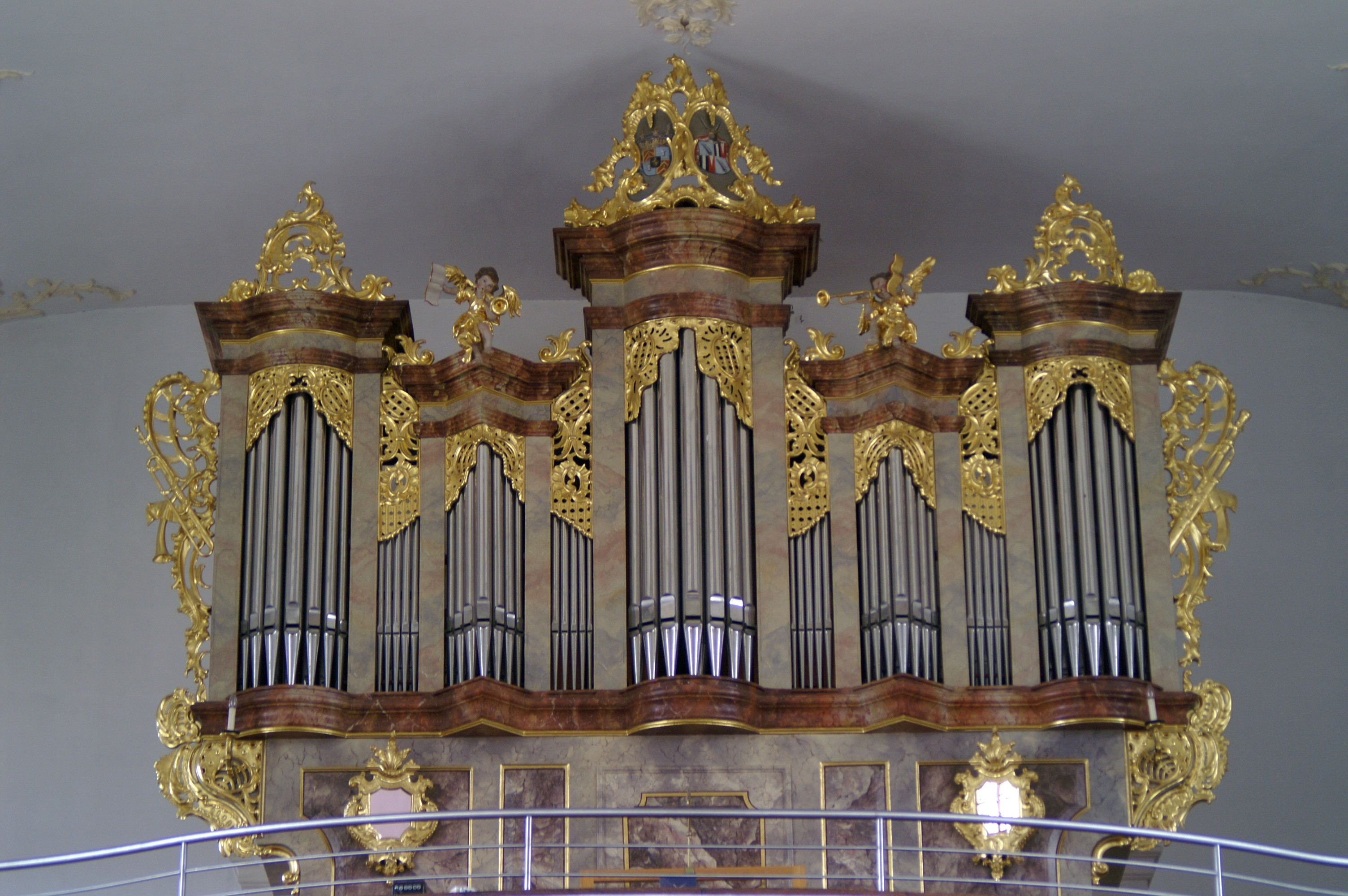 Orgel der Pfarrkirche in Offenstetten